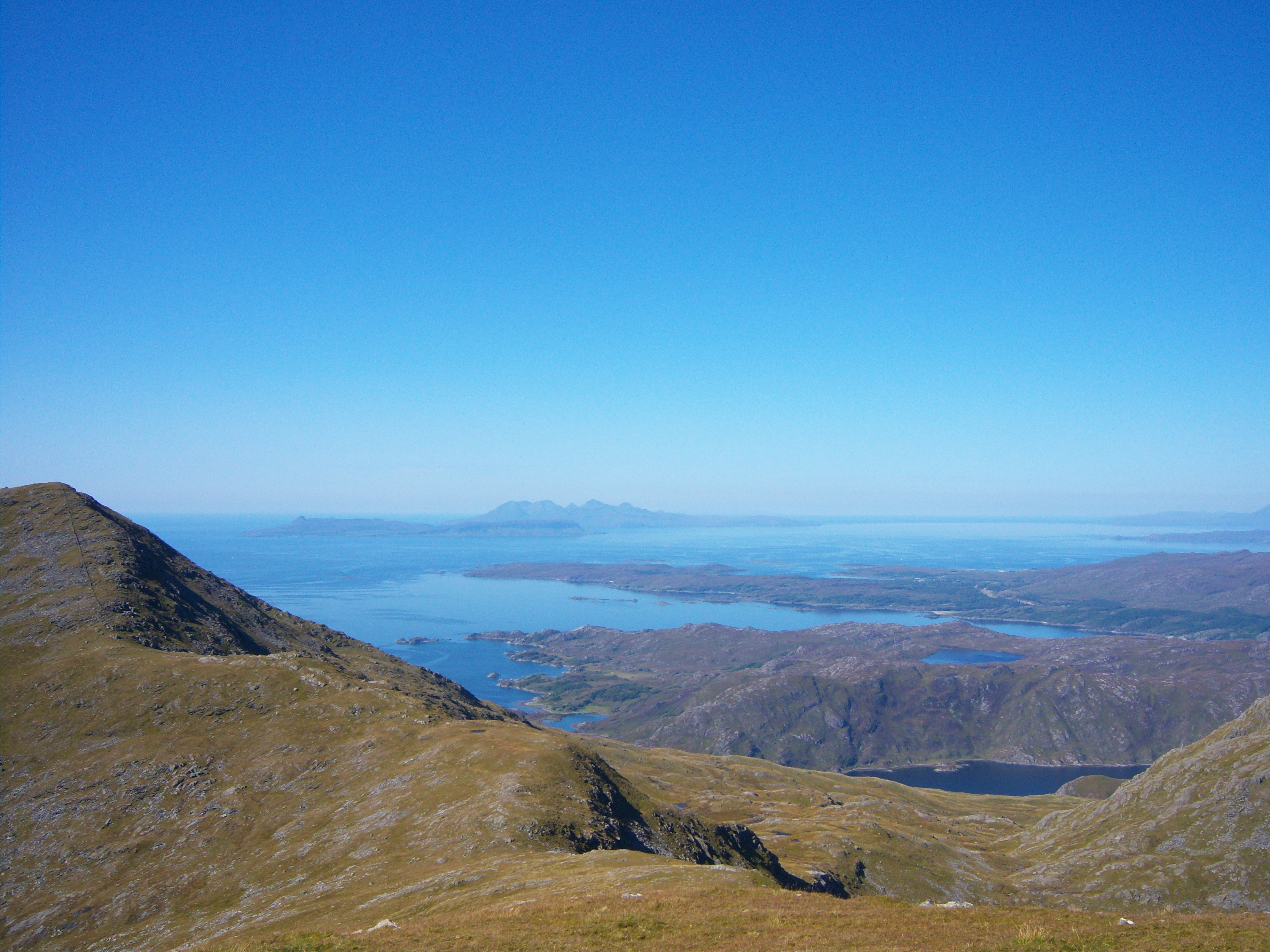 From Sgùrr na Bà Glaise in Moidart